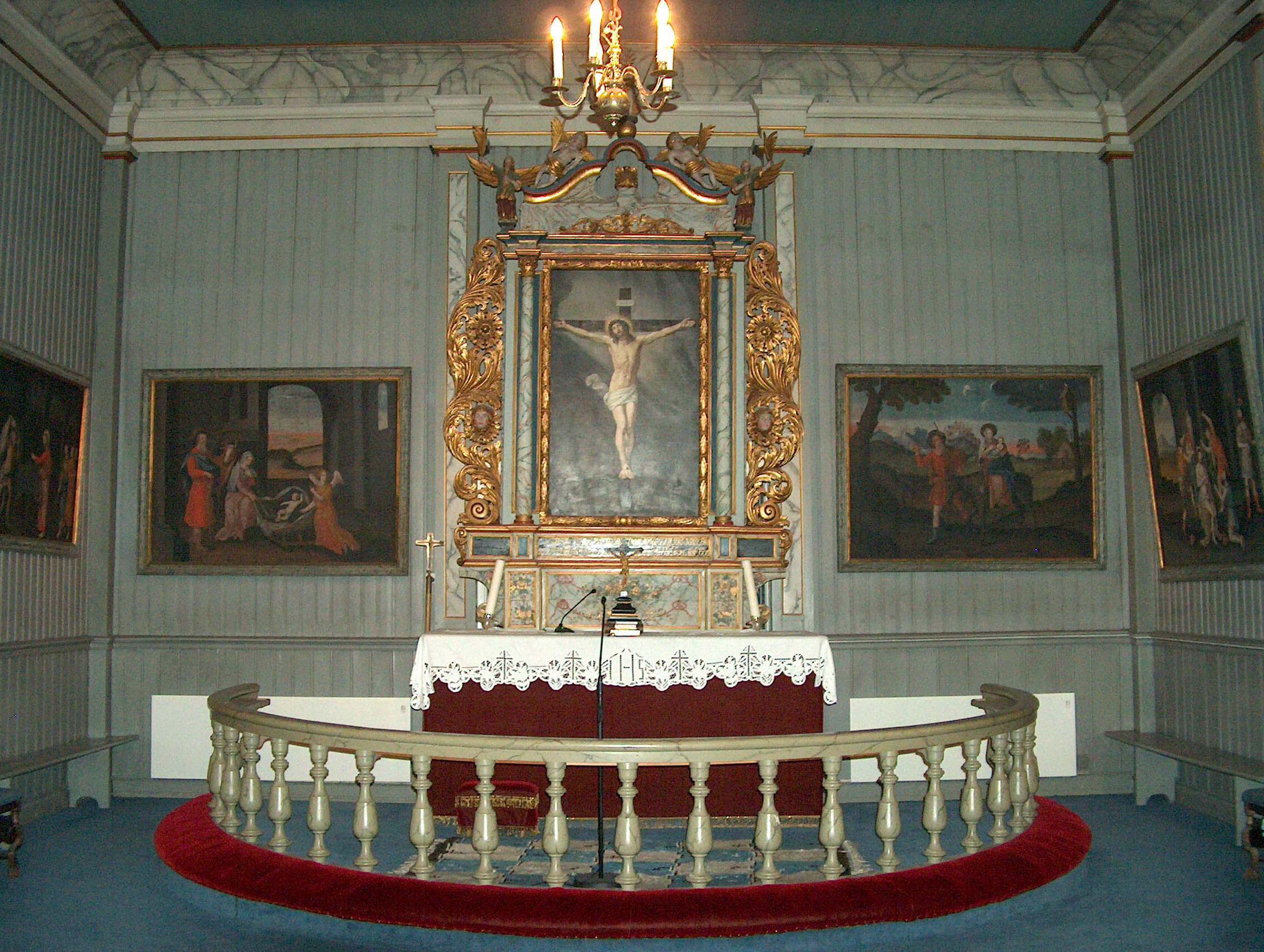 Lunder kirke, Sokna (alter). Altertavlen er skåret av Nicolai Borg. Bildet er malt av Christen Brun i kopi etter Guido Reni.